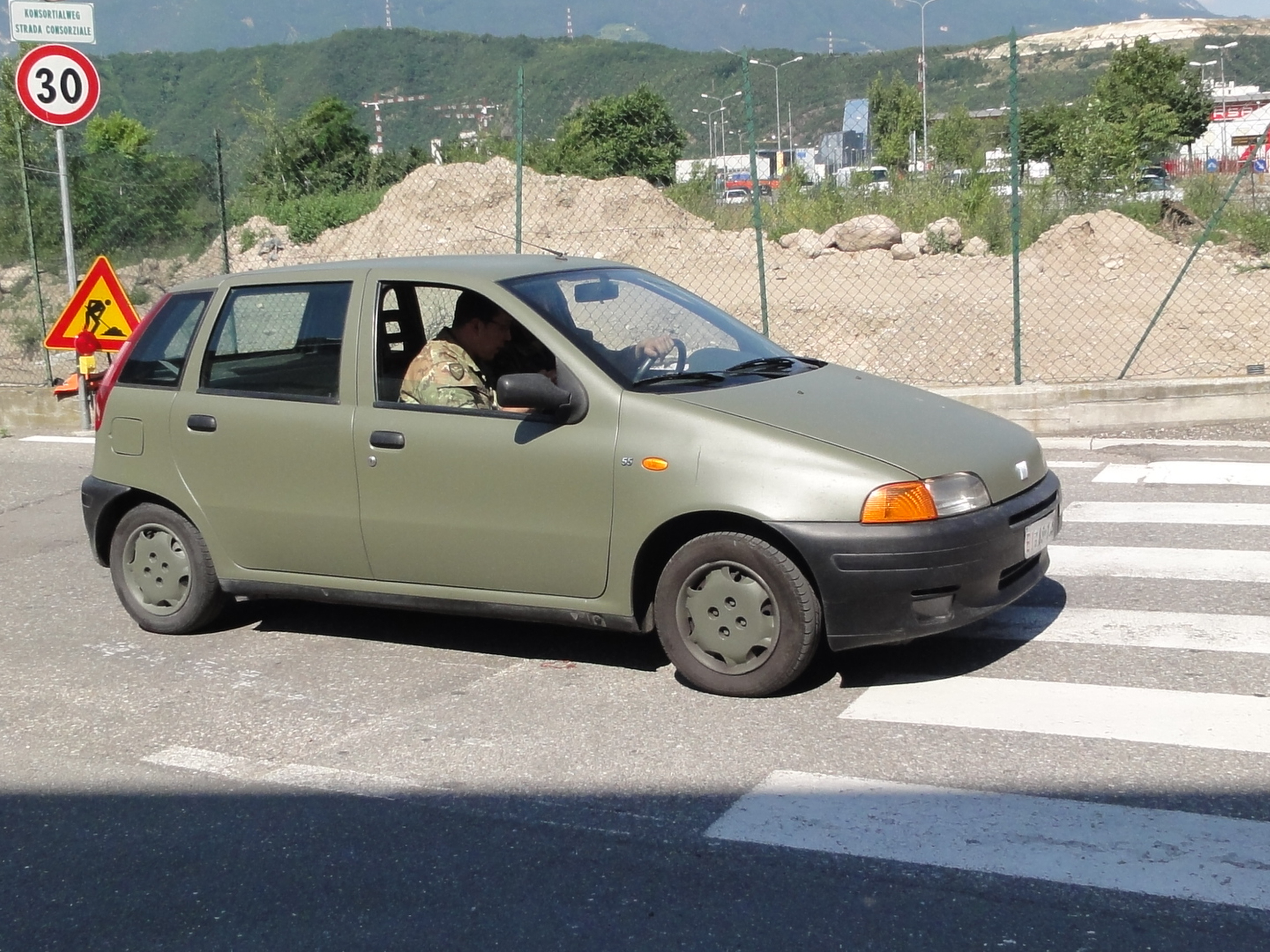 Fiat Punto des italienischen Heeres